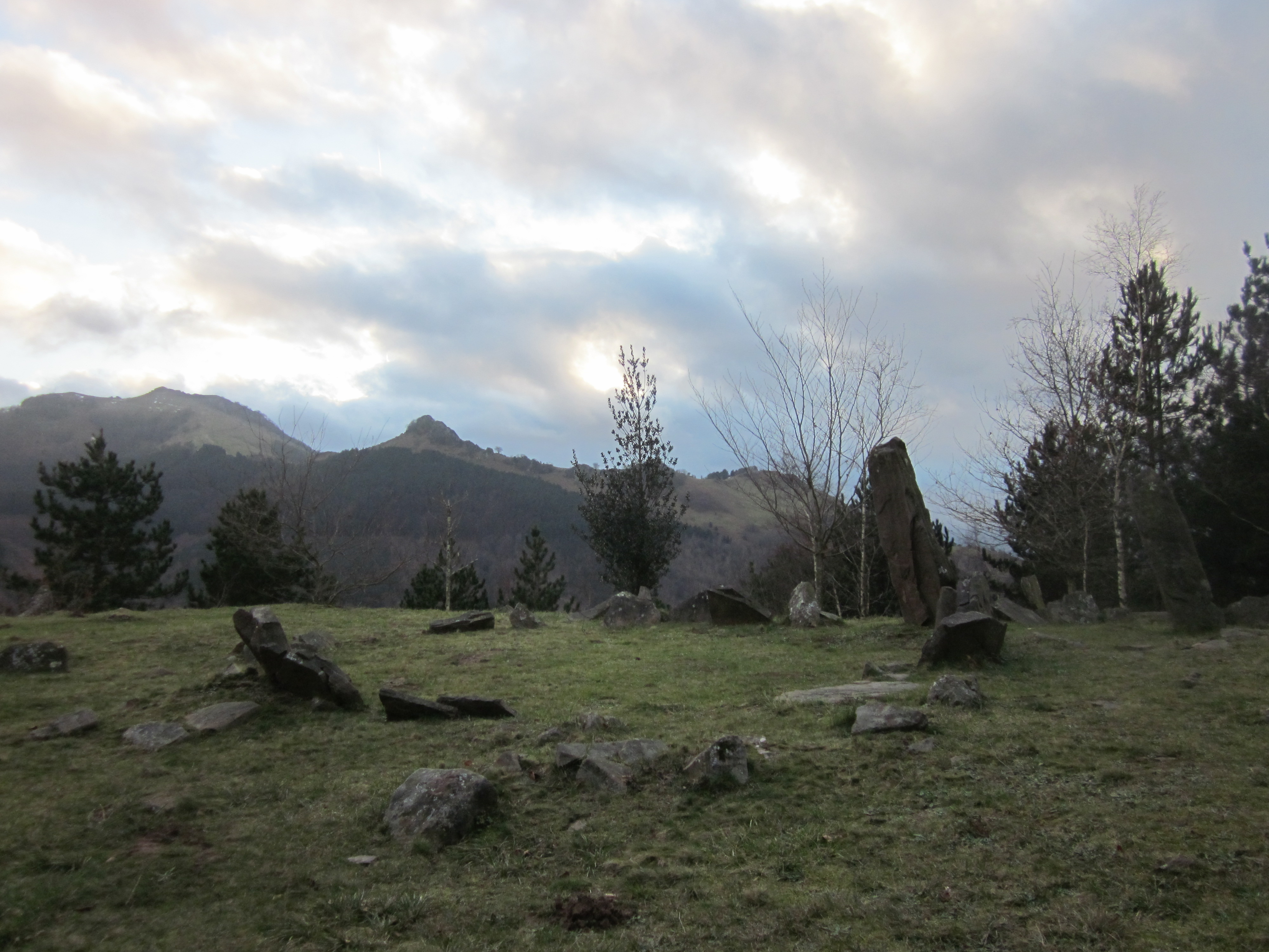 Cromlech de Mulisko gainaEuskara: Mulisko gaineko harrespiletako bat.